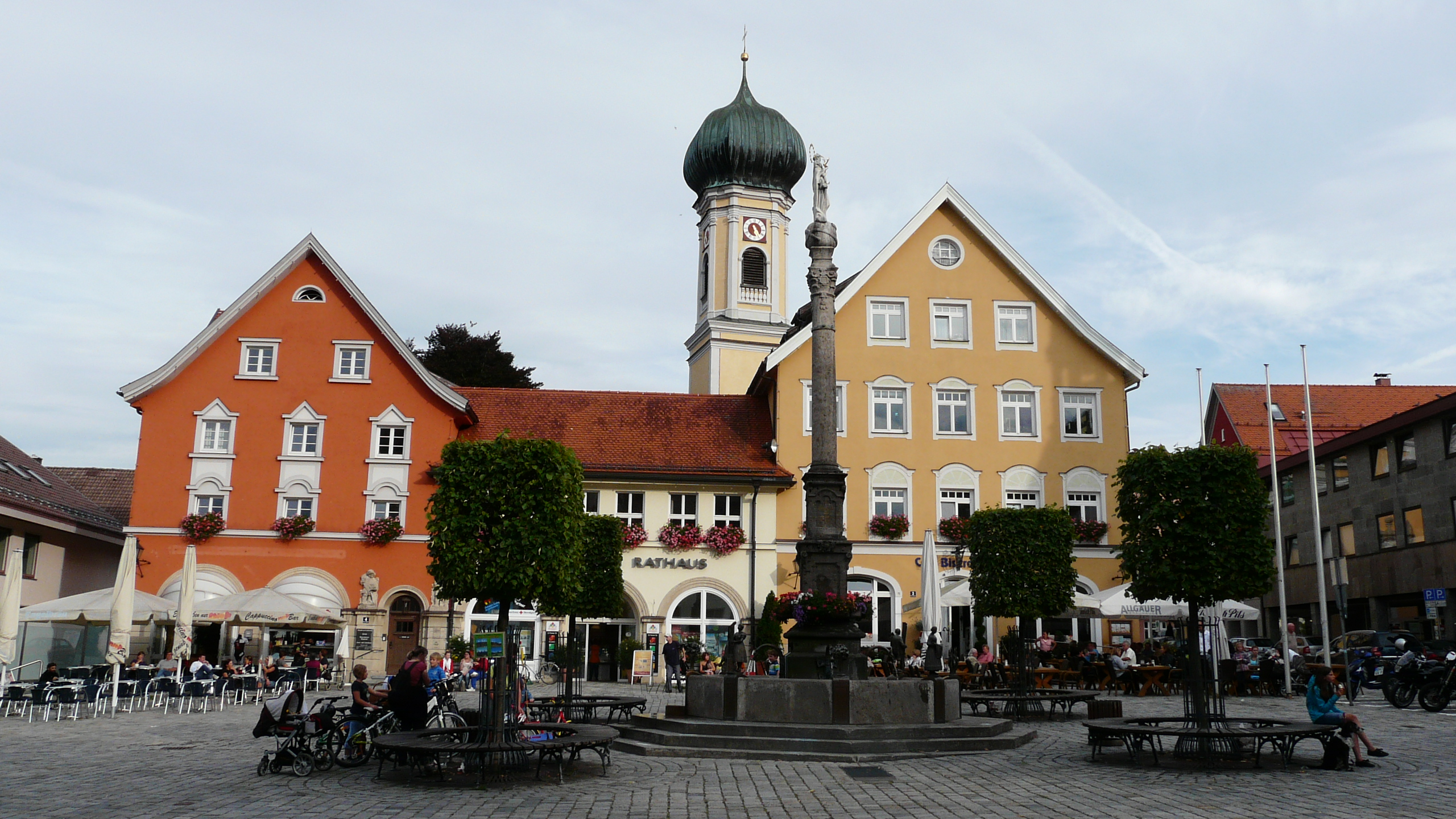 Mariensäule in Immenstadt im Allgäu